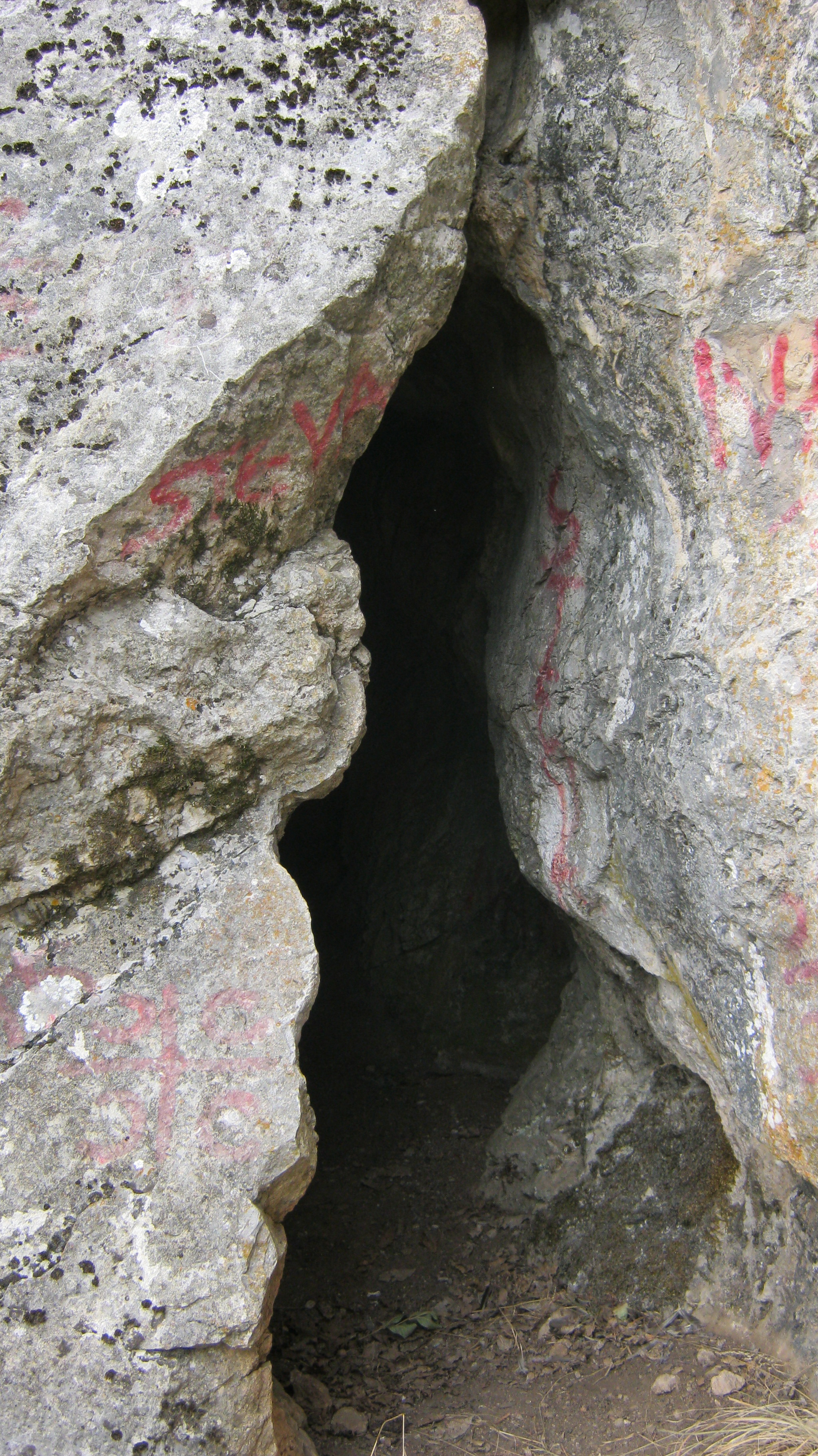 Српски (ћирилица): Улаз у Сибничку пећину на Гледићким планинама